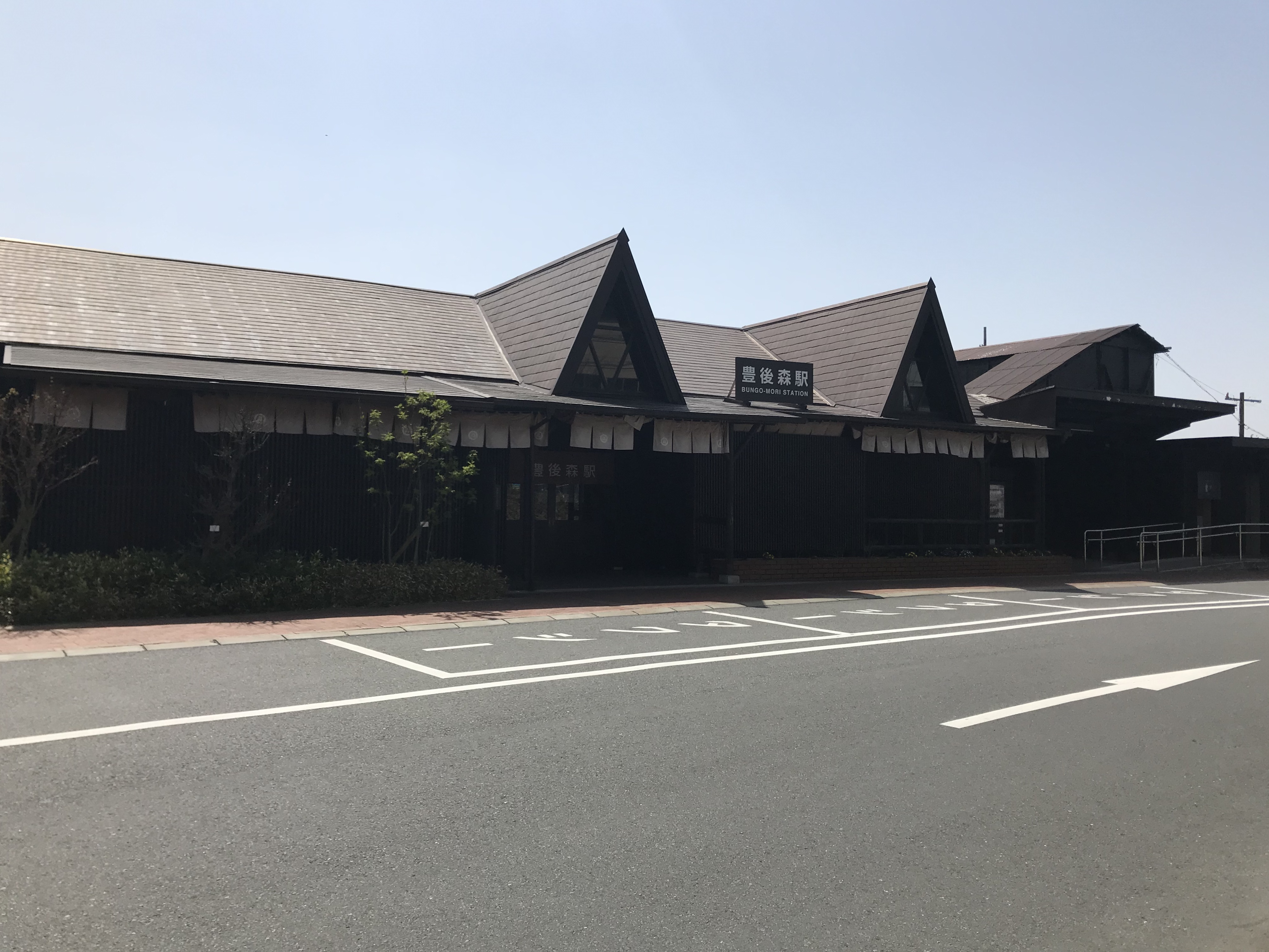 豊後森駅駅舎